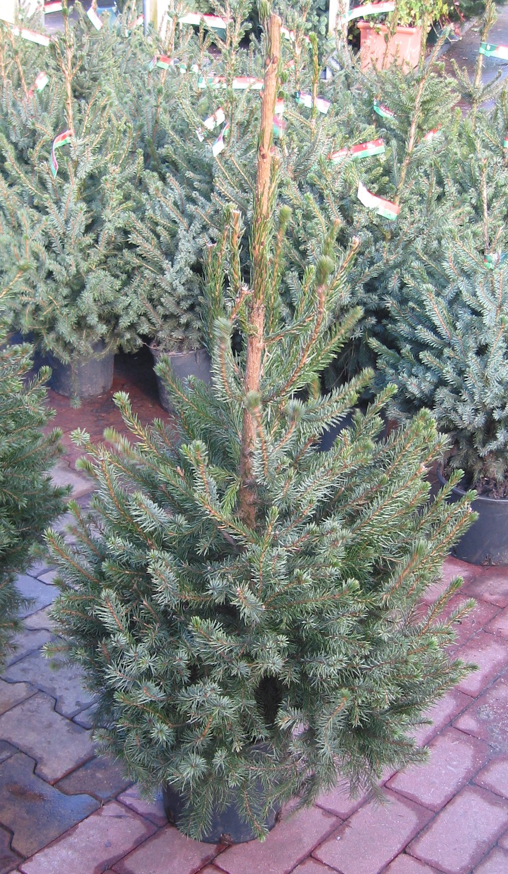 (Picea omorika kerstboom), Christmas tree